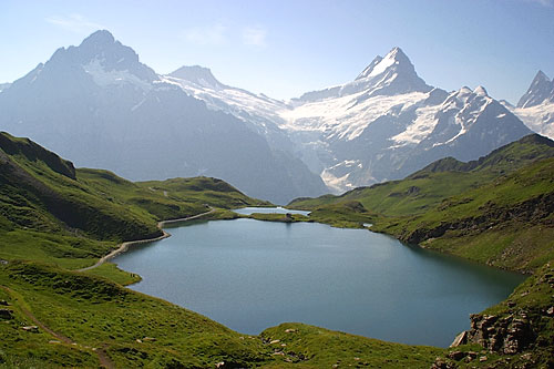 Bachalpsee oberhalb von Grindelwald BE, Schweiz